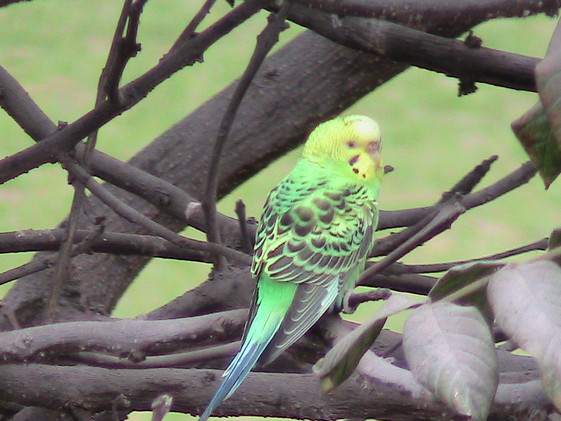 Melopsittacus undulatus